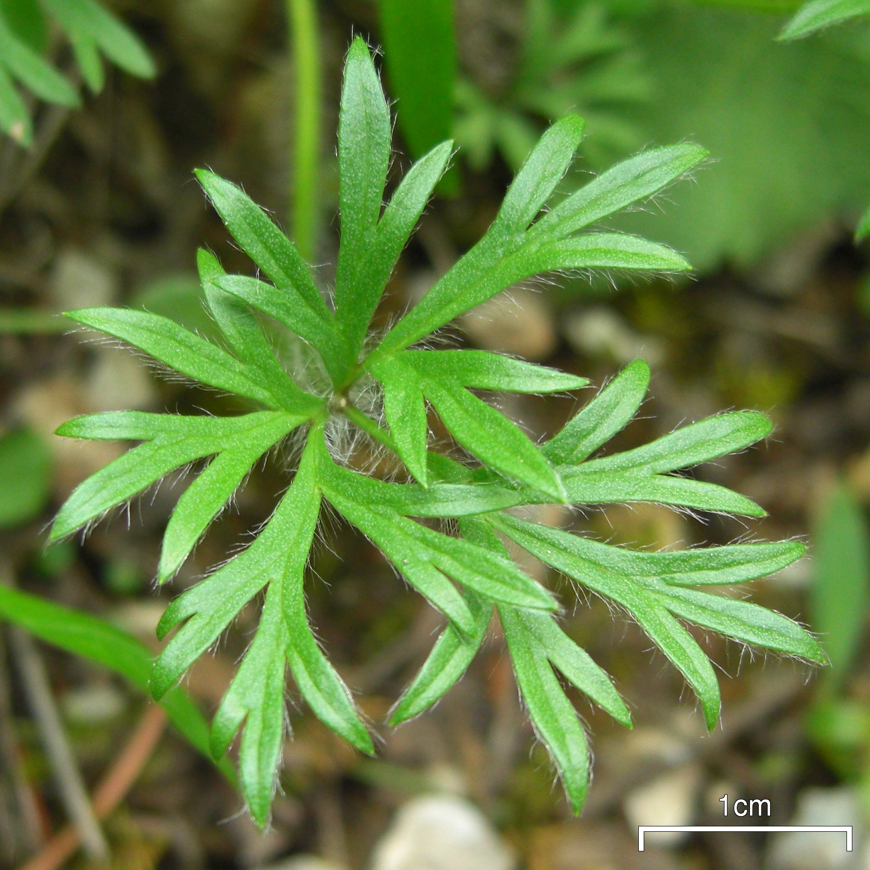 Anemone multifidaPoir. 20090528.8 Vavenby, BC